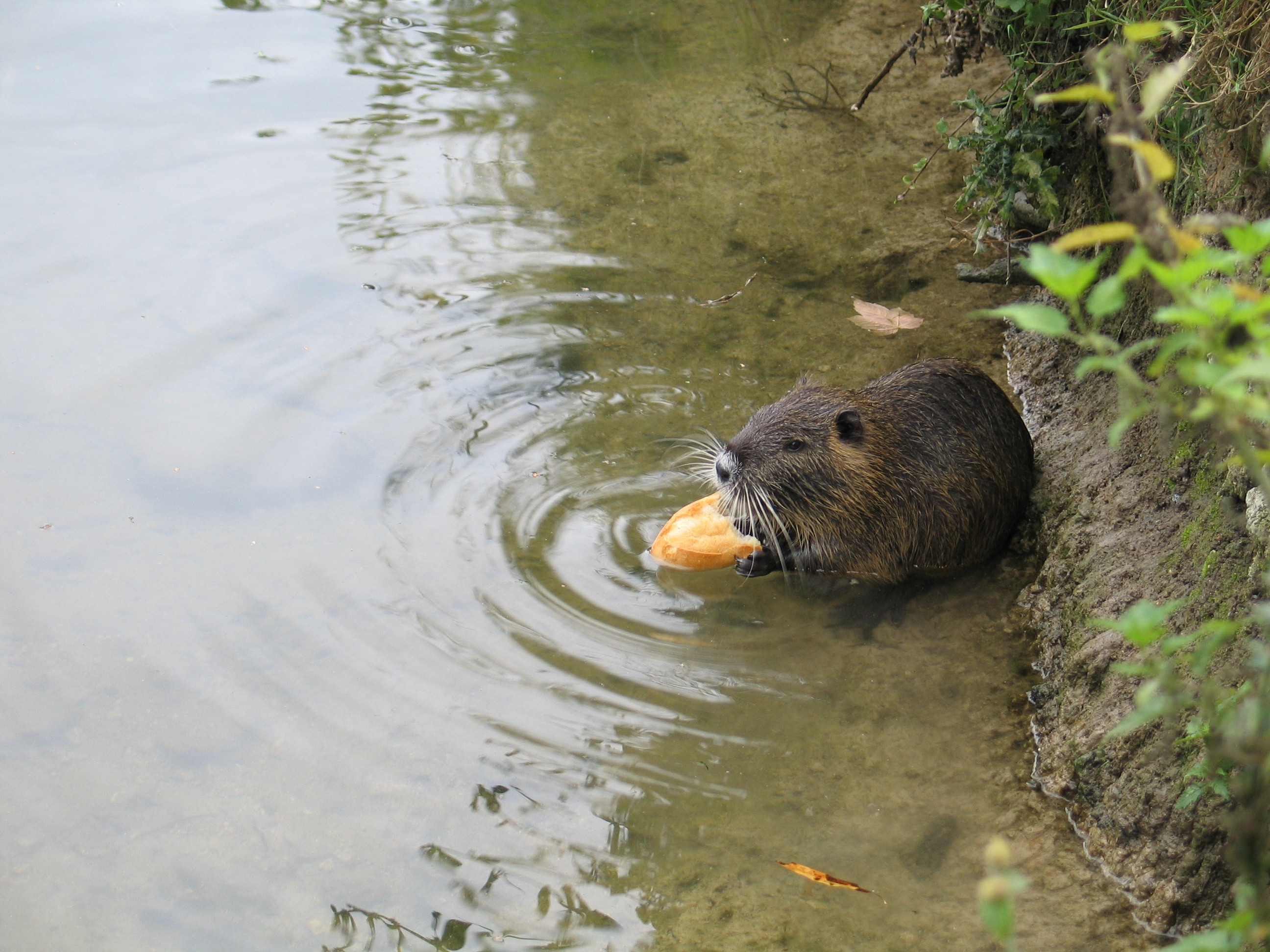 Ragondin mangeant un bout de pain sur le bord d'une rivière